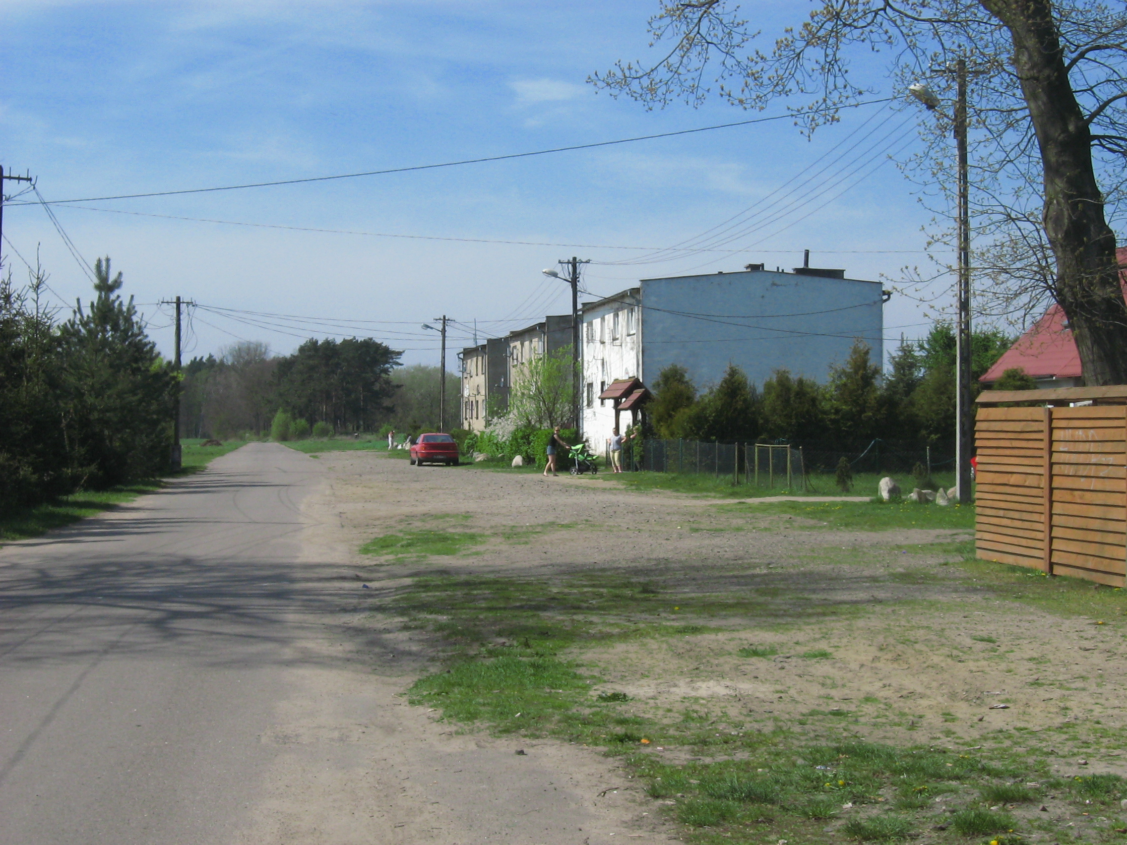 Łuskowo